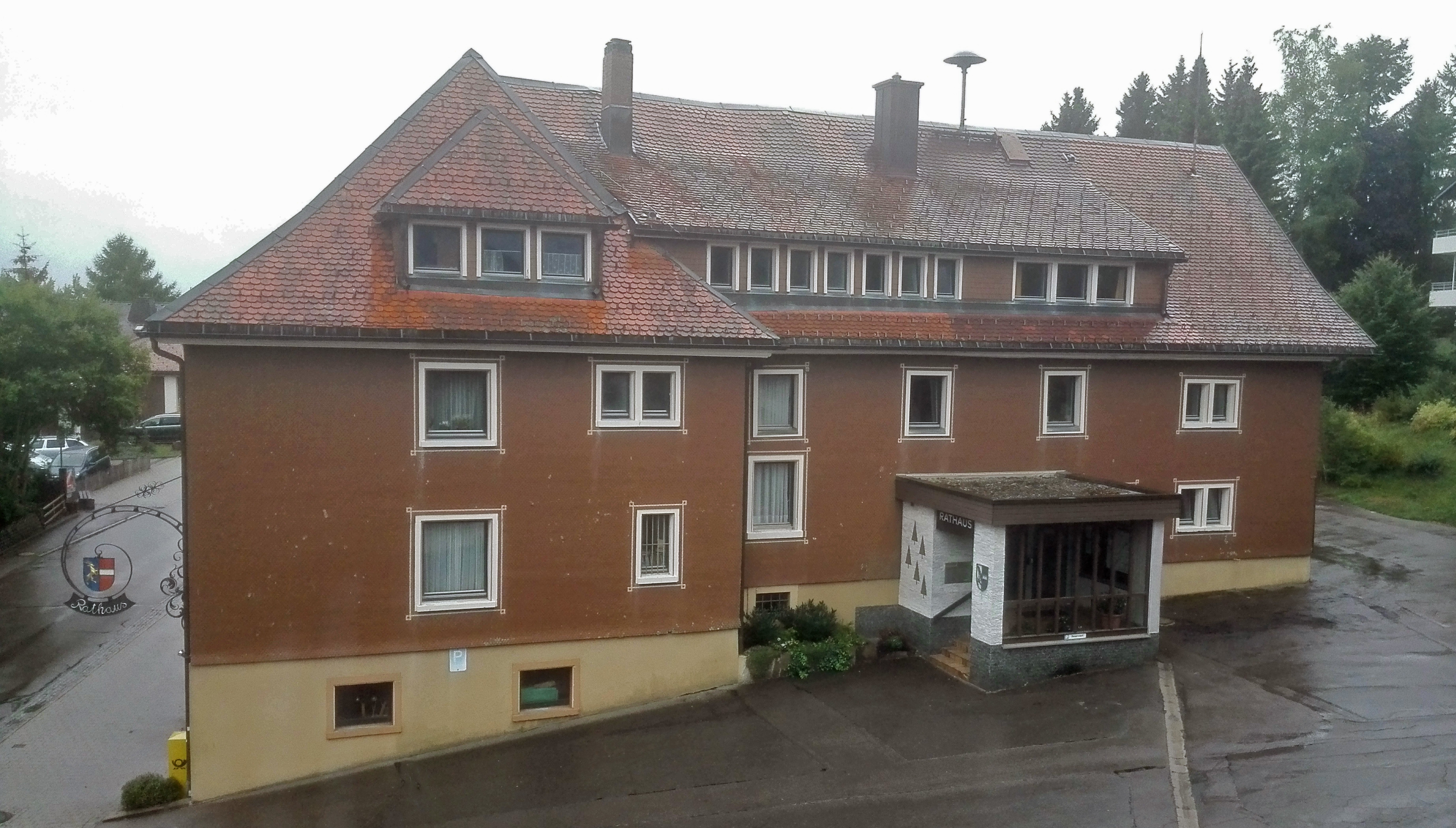 Das Rathaus in Höchenschwand, Baden-Württemberg